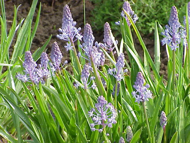 Species: Scilla litardierei (syn. Scilla pratensis) Family: Liliaceae Image No. 3